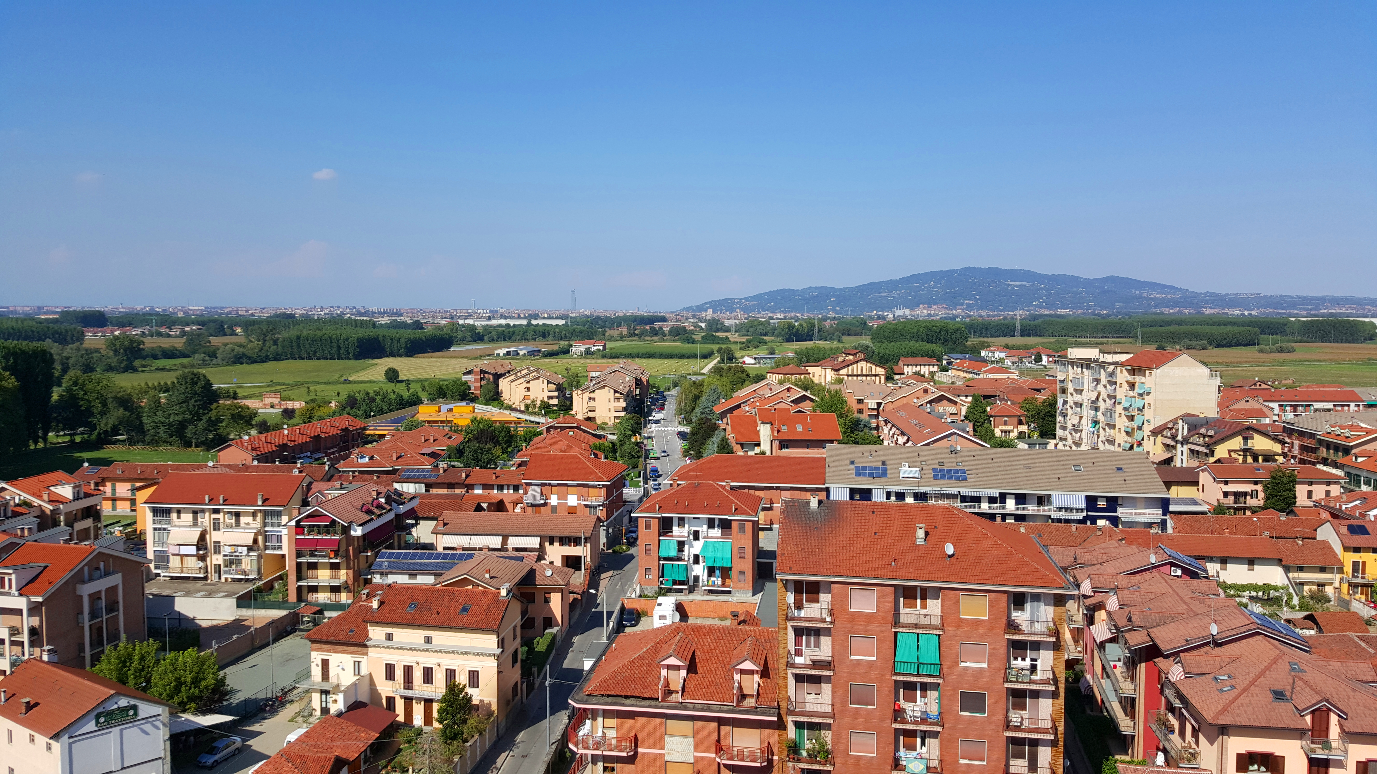 Via Marconi, Collina Moncalieri